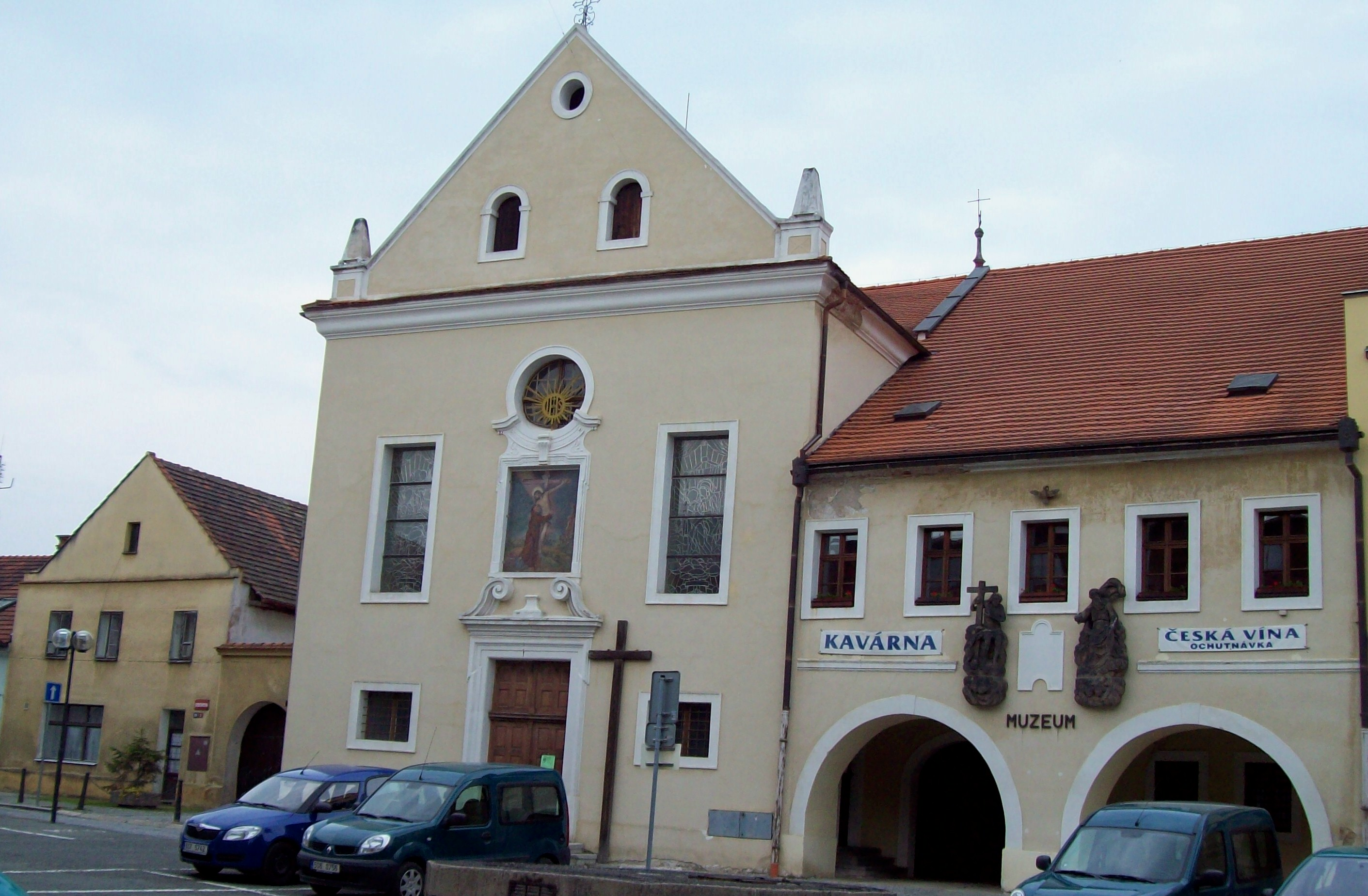 Kostel Čtrnácti svatých pomocníků (vlevo) a Regionální muzeum v Mělníku, náměstí Míru. Dříve byly prostory muzea kapucínským klášterem.